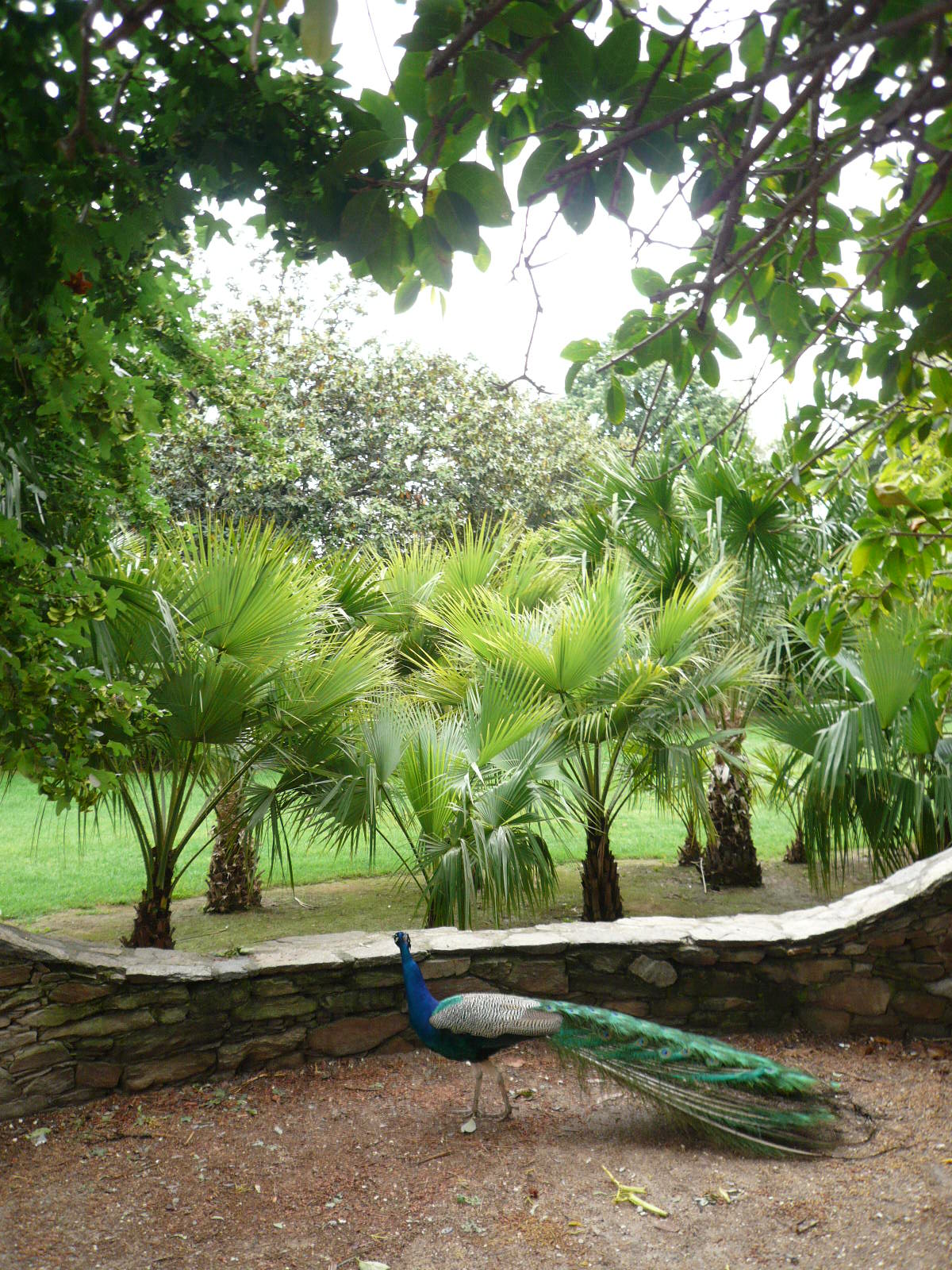 Faune et flore au jardin Olbius Riquier